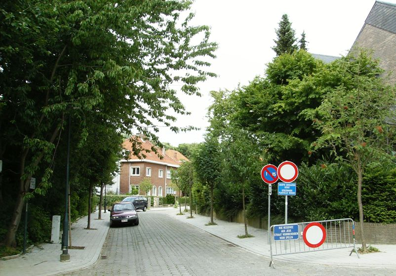 clos des Mesanges Auderghem Belgium